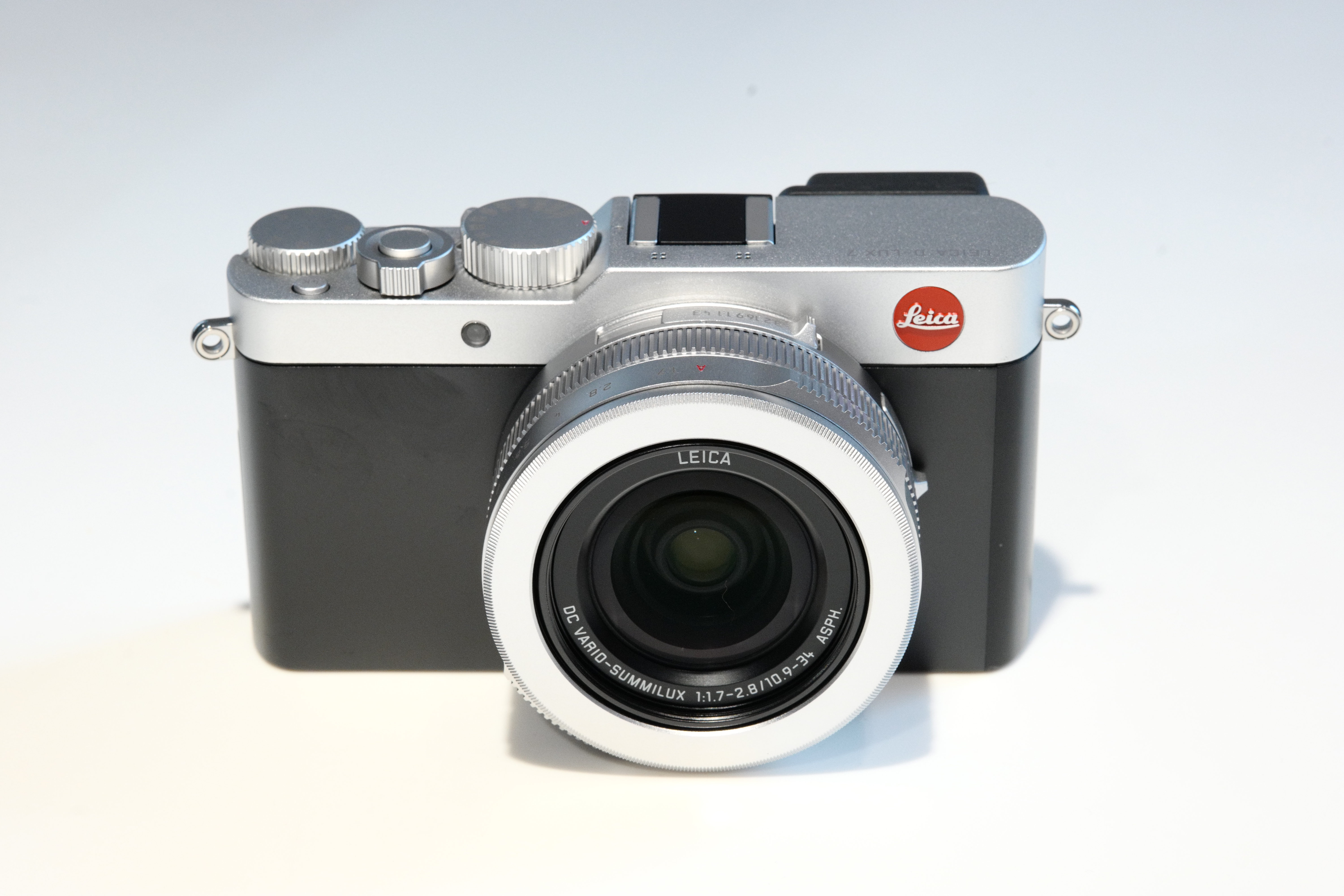 Leica D-Lux 7